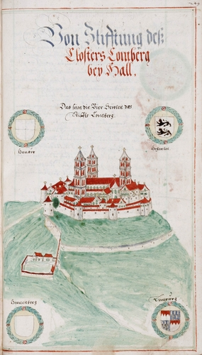 Kloster Komburg bei Schwäbisch Hall aus einer Schwäbisch Haller Chronik Ende des 16. Jahrhunderts